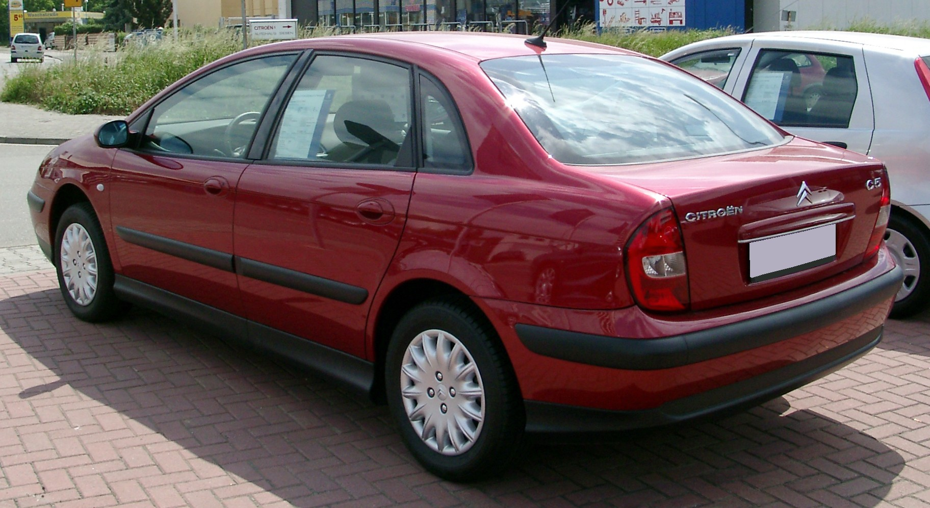 Citroen C5